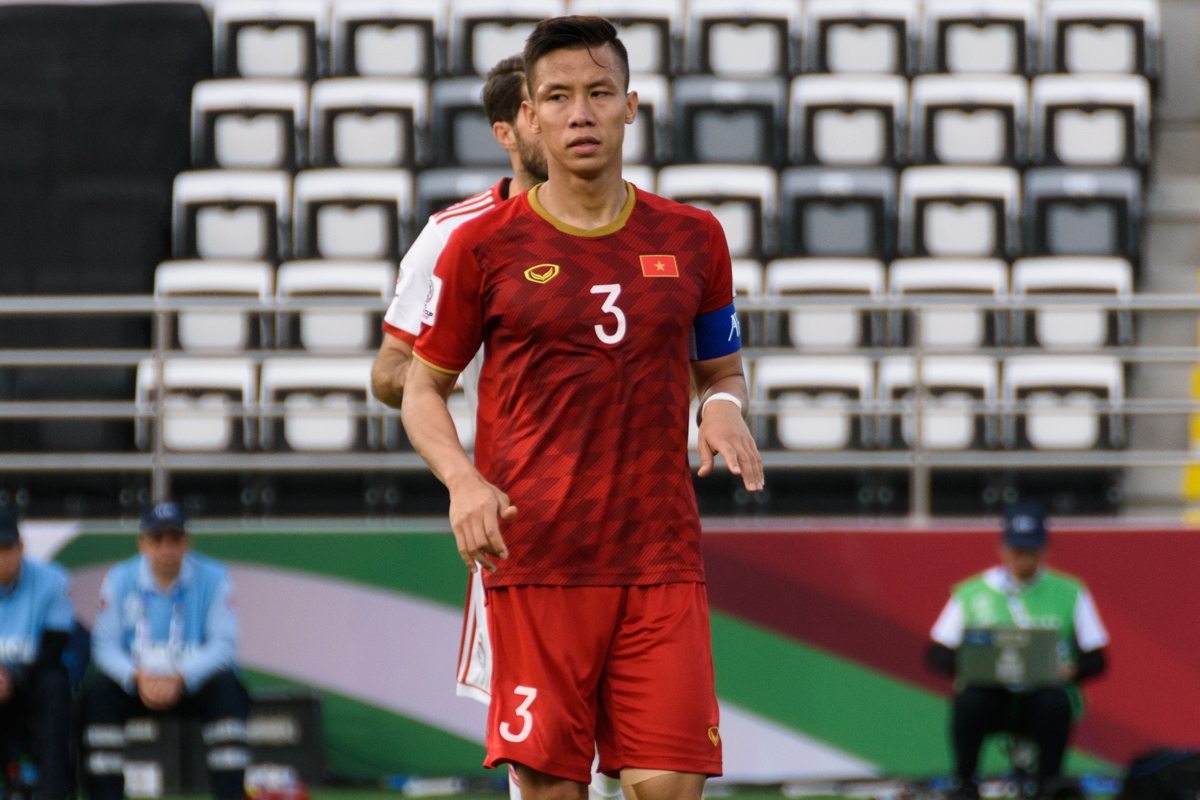 Quế Ngọc Hải at the Asian Cup 2019